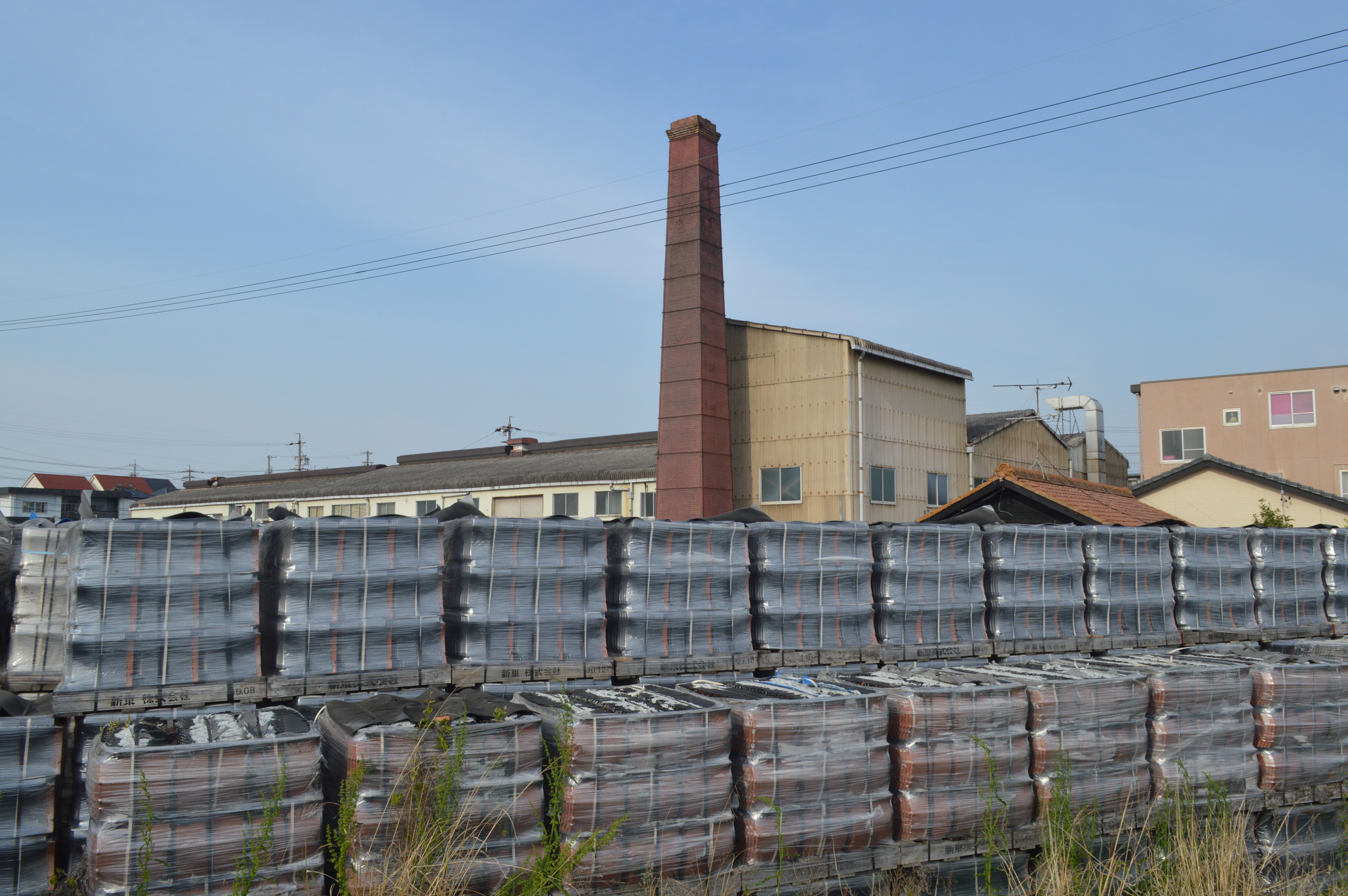 愛知県高浜市にある新東株式会社二池工場。三州瓦の製造メーカー。